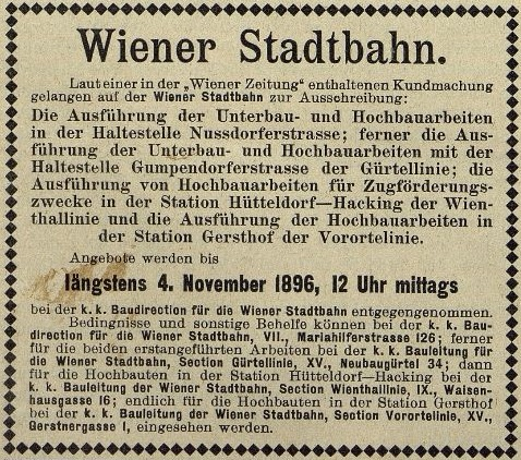 Ausschreibung von Bauarbeiten für die Wiener Stadtbahn in der Oberösterreichischen Bauzeitung